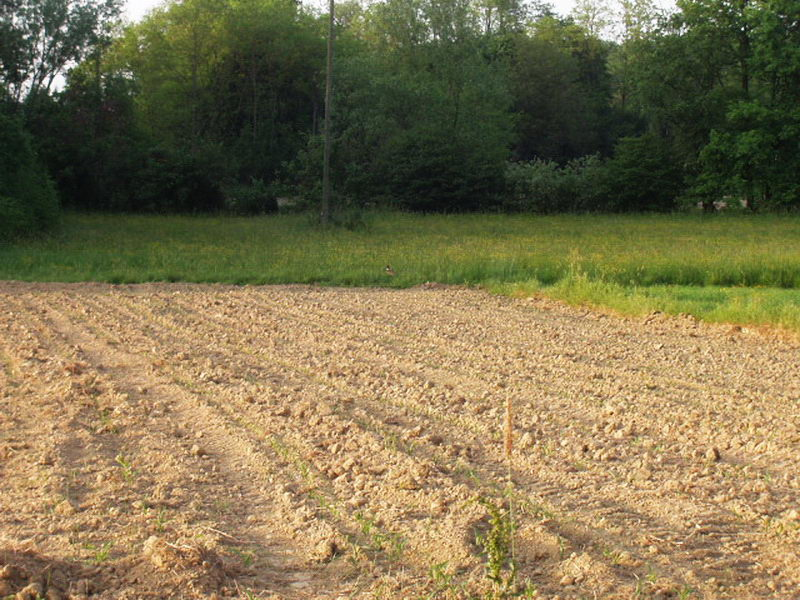 Pokasin - Fields